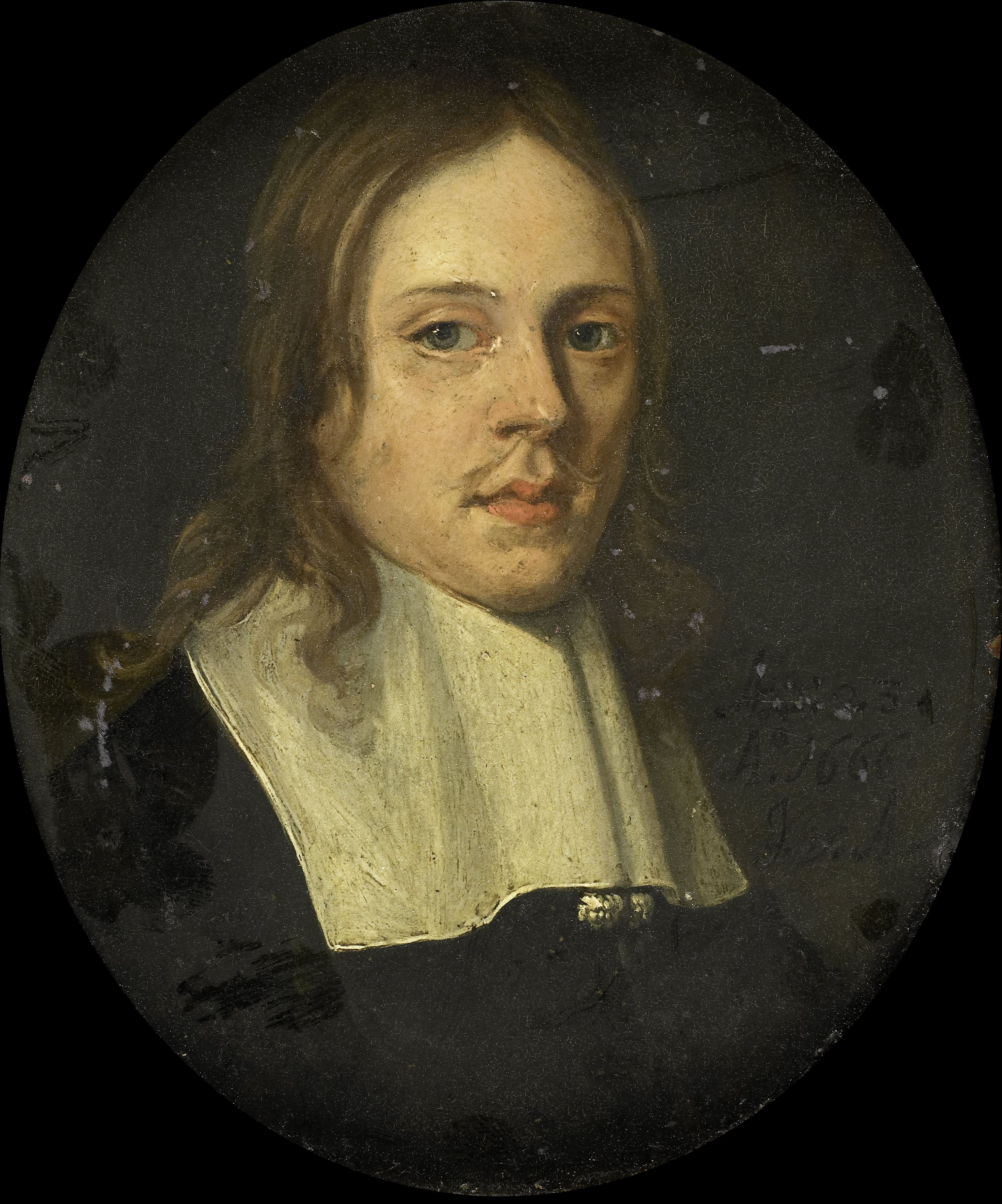 Portret van een jonge man. Buste naar rechts, het gezicht naar de beschouwer gewend.